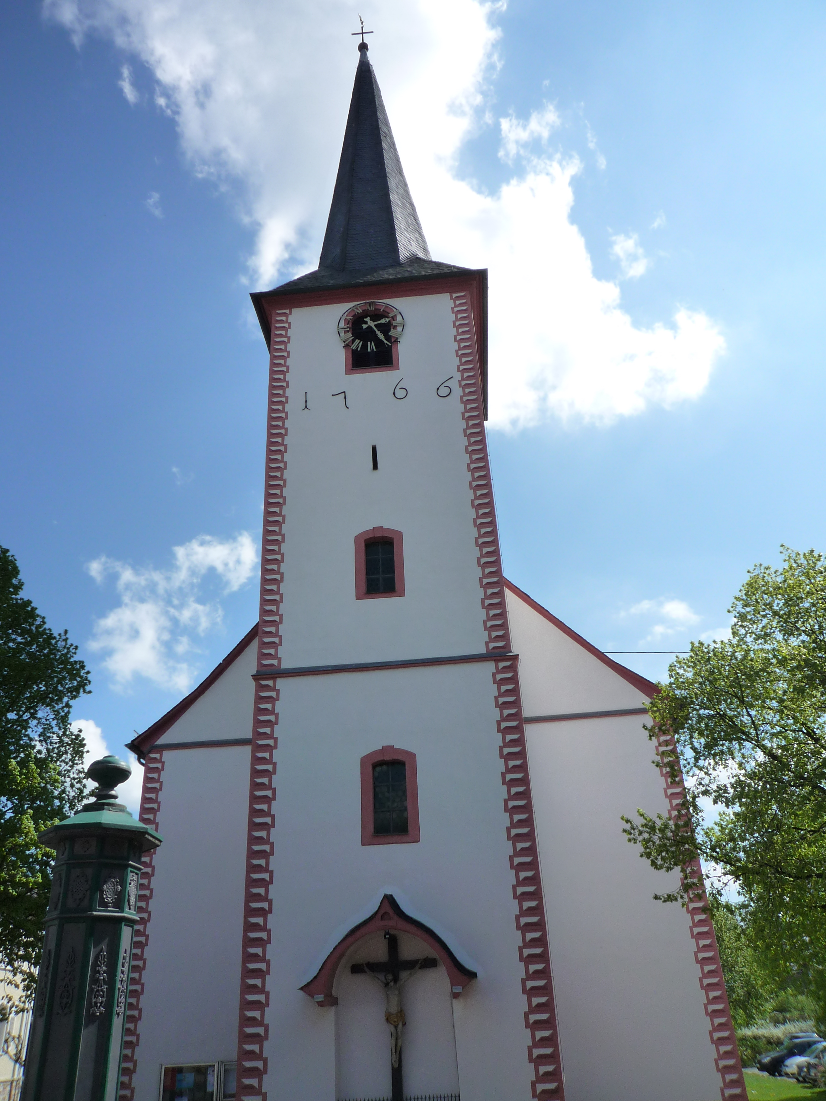 Frontansicht der katholischen Kirche in Herschbach